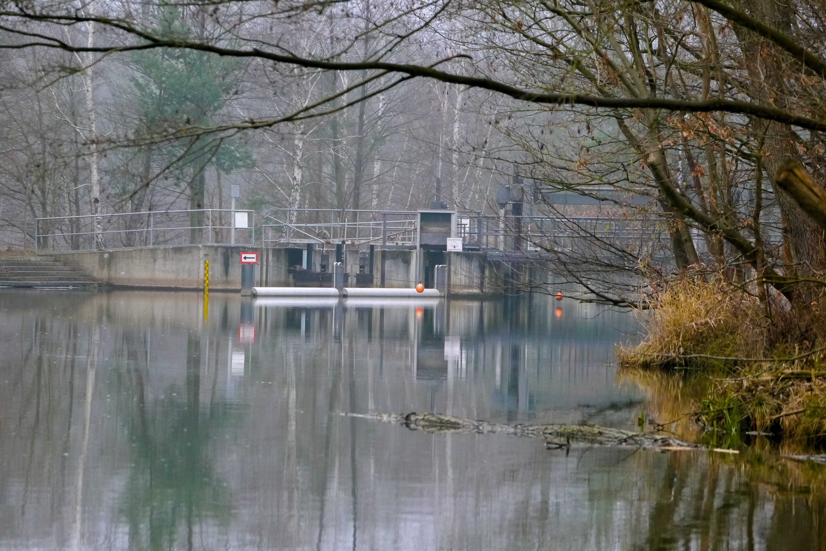 Spreewald bei Schlepzig im Winter, Wehr Schlepzig